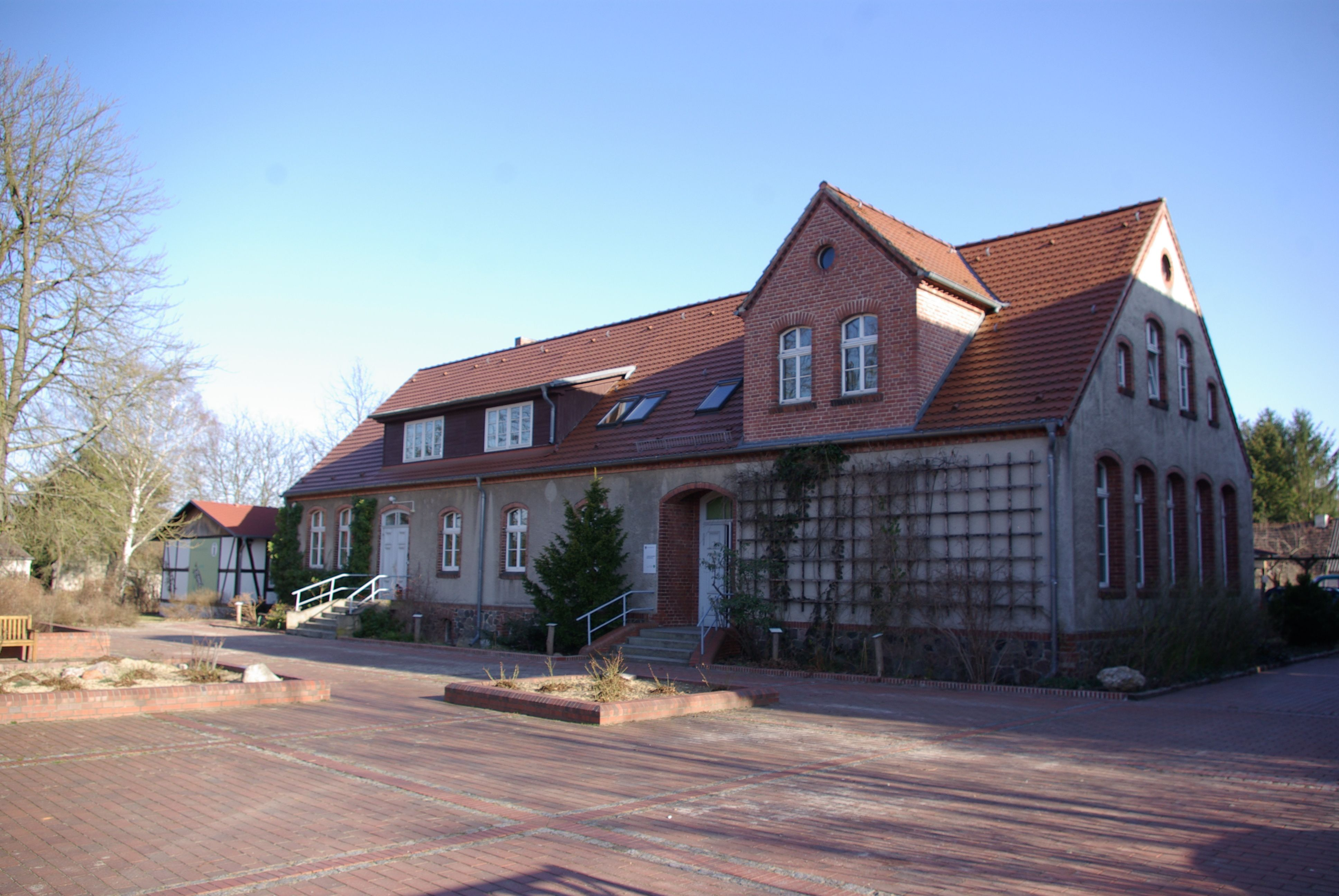 Heidesee Ortsteil Prieros in Brandenburg. Die alte Schule steht unter Denkmalschutz. Heute befindet sich dort ein Informationszentrum.